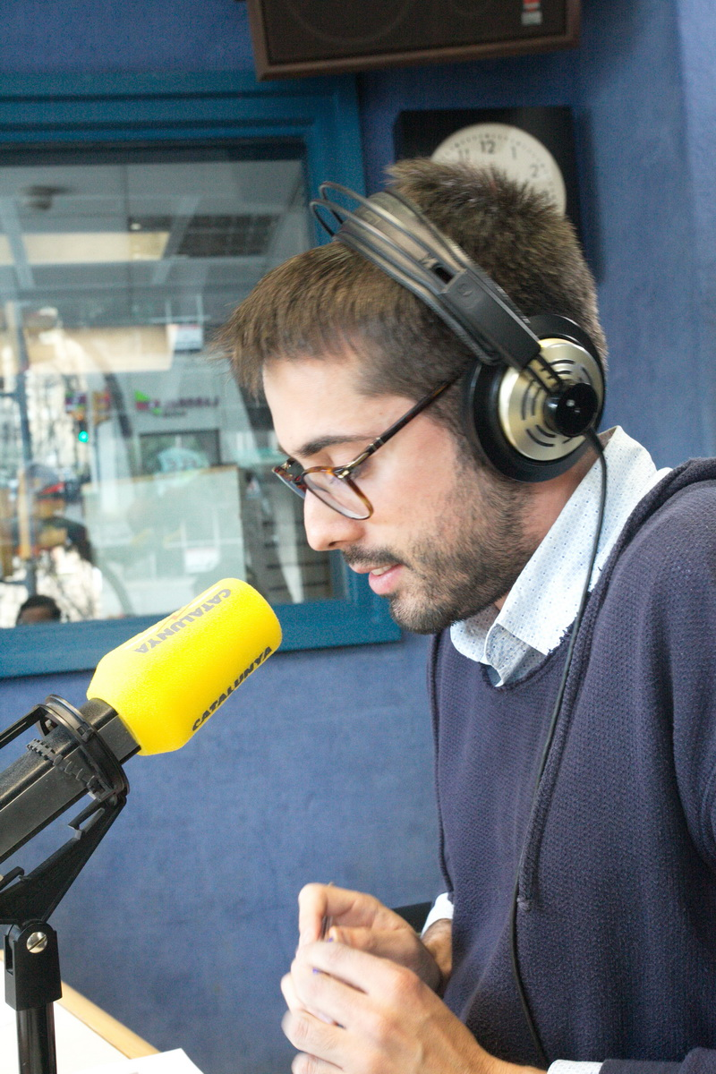 Imatges captades durant la Viquimarató Ramon Barnils a Catalunya Ràdio el 13-3-2015 per commemorar els 14 anys de la mort del periodista Ramon Barnils